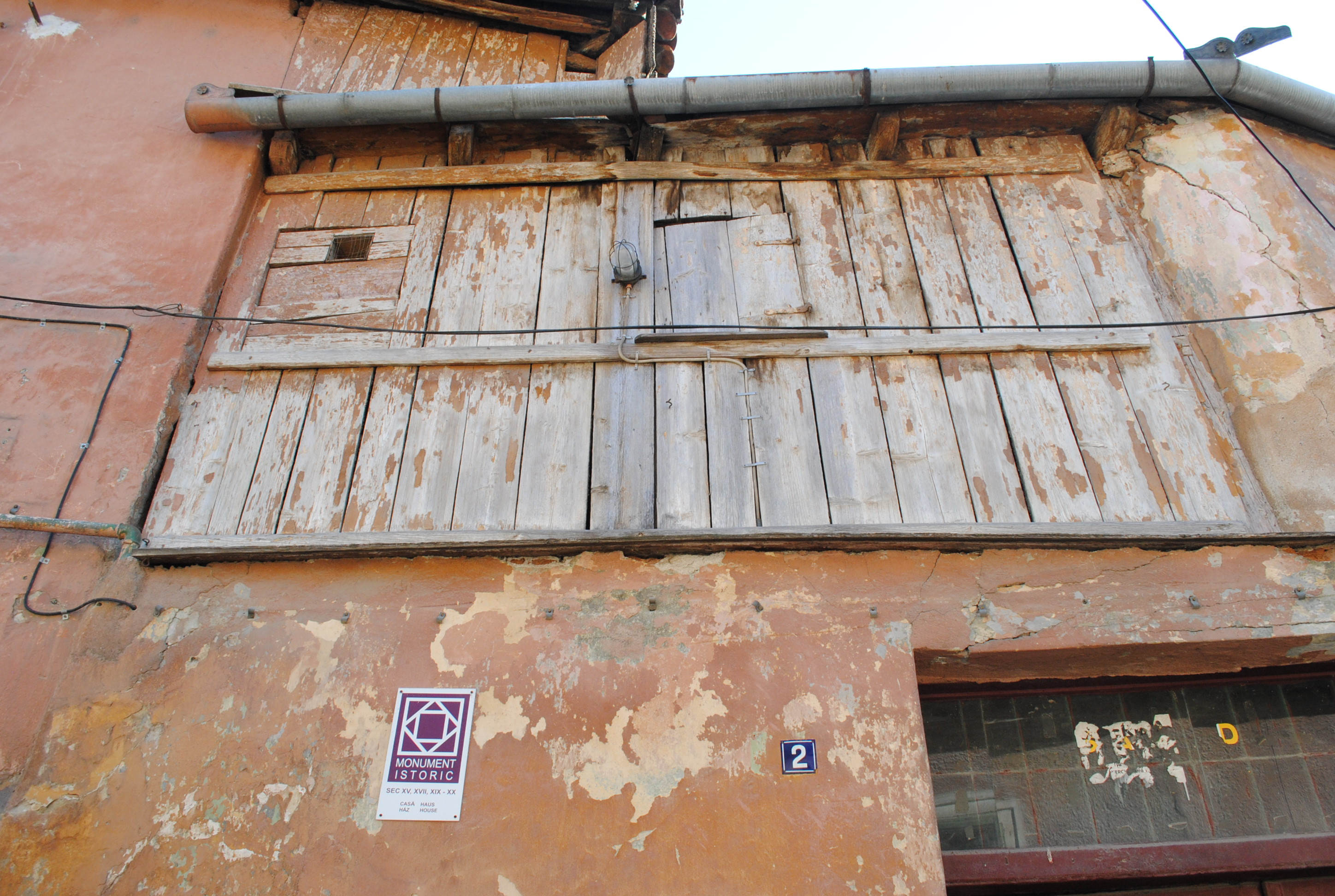 Casă, sec. XV, sec. XVII, a doua jum. a sec. XIX - primul sfert al sec. XX